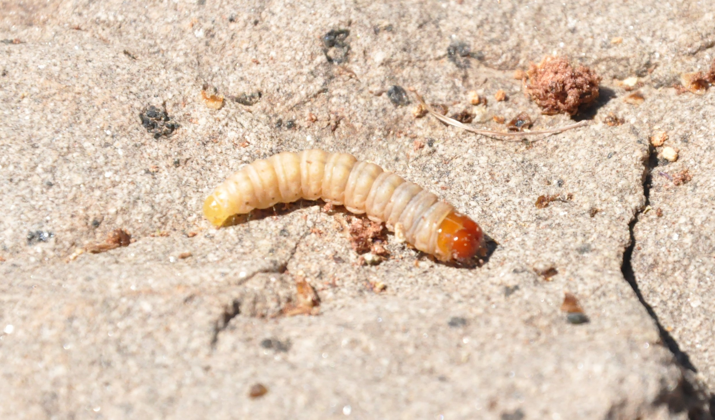 Castnia psittachus en Puya alpestris ssp zoellnerii en Cuesta Chacabuco, Región Metropolitana de Santiago, Chile